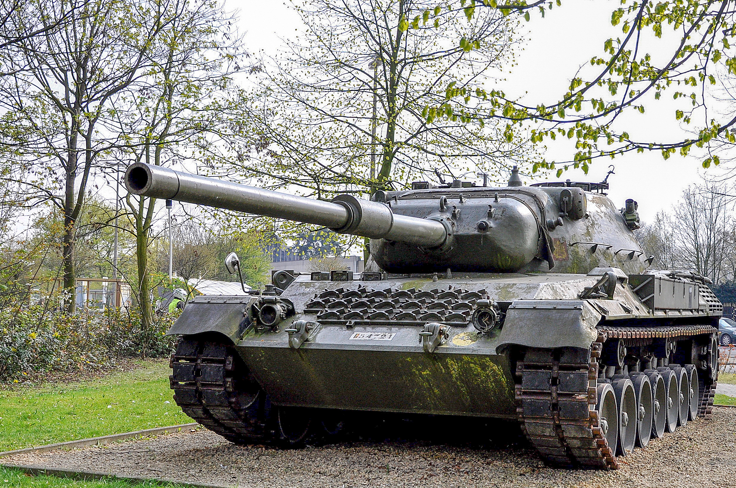 Tankmonument Leopard IA5 voorzijde - Zelzate